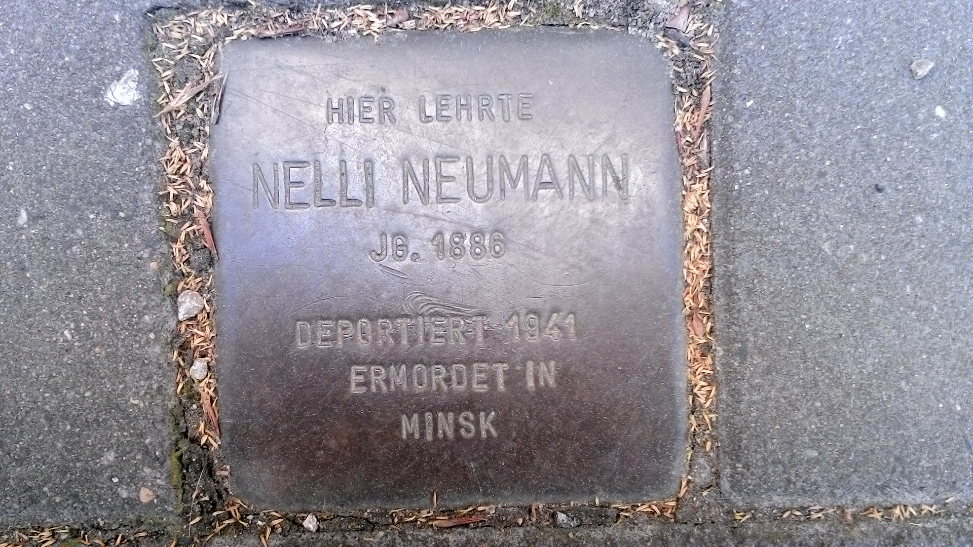 Hier lehrte Nelli Neumann, Jg. 1886, deportiert 1841, ermordet in Minsk